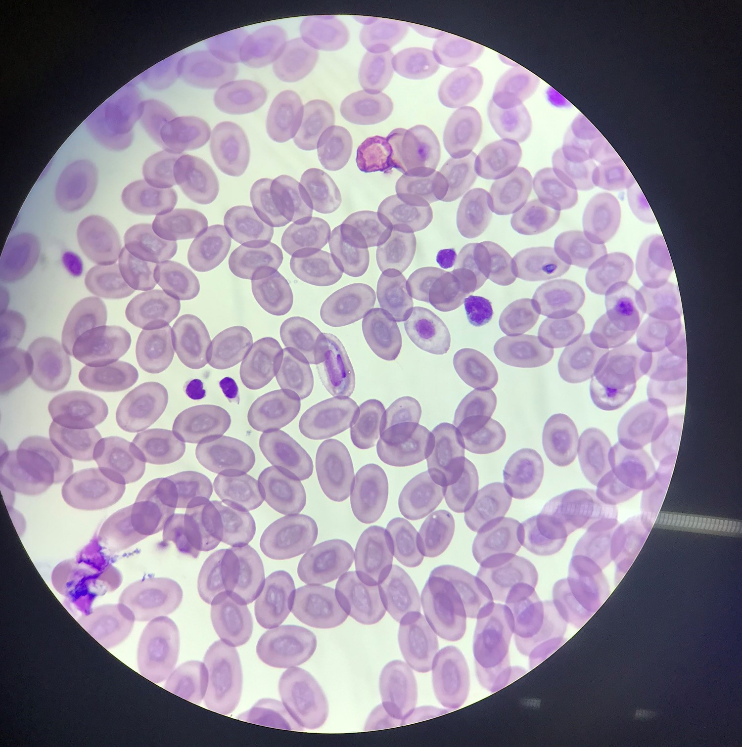 Červená krvinka s 2 hepatozoony získaná z krevního roztěru plaza, zvětšení 1000x s použitím imerzního oleje. Zdroj preparátu katedra Parazitologie Přf UK.